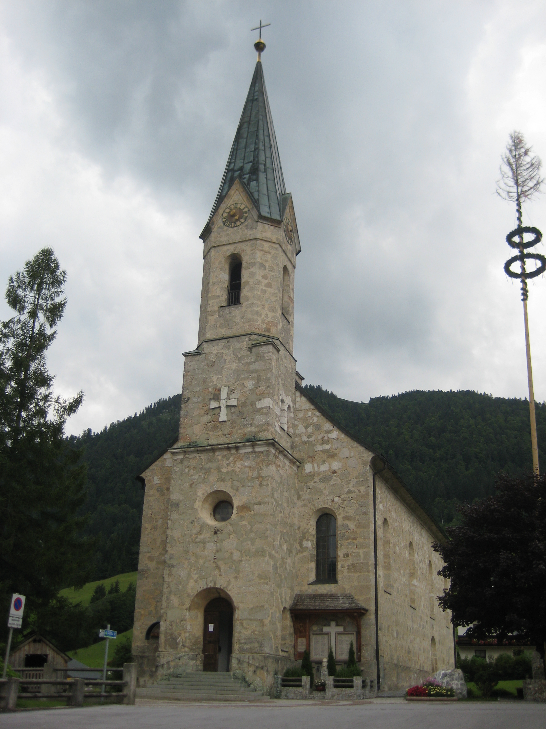 Kath. Pfarrkirche hl. Kreuz